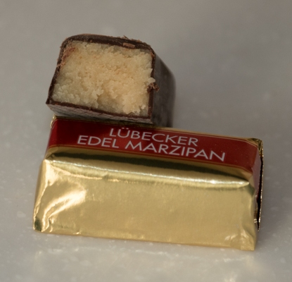 Lübecker Edel Marzipan